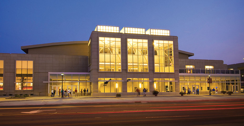 Bradley_U_Renaissance_Coliseum